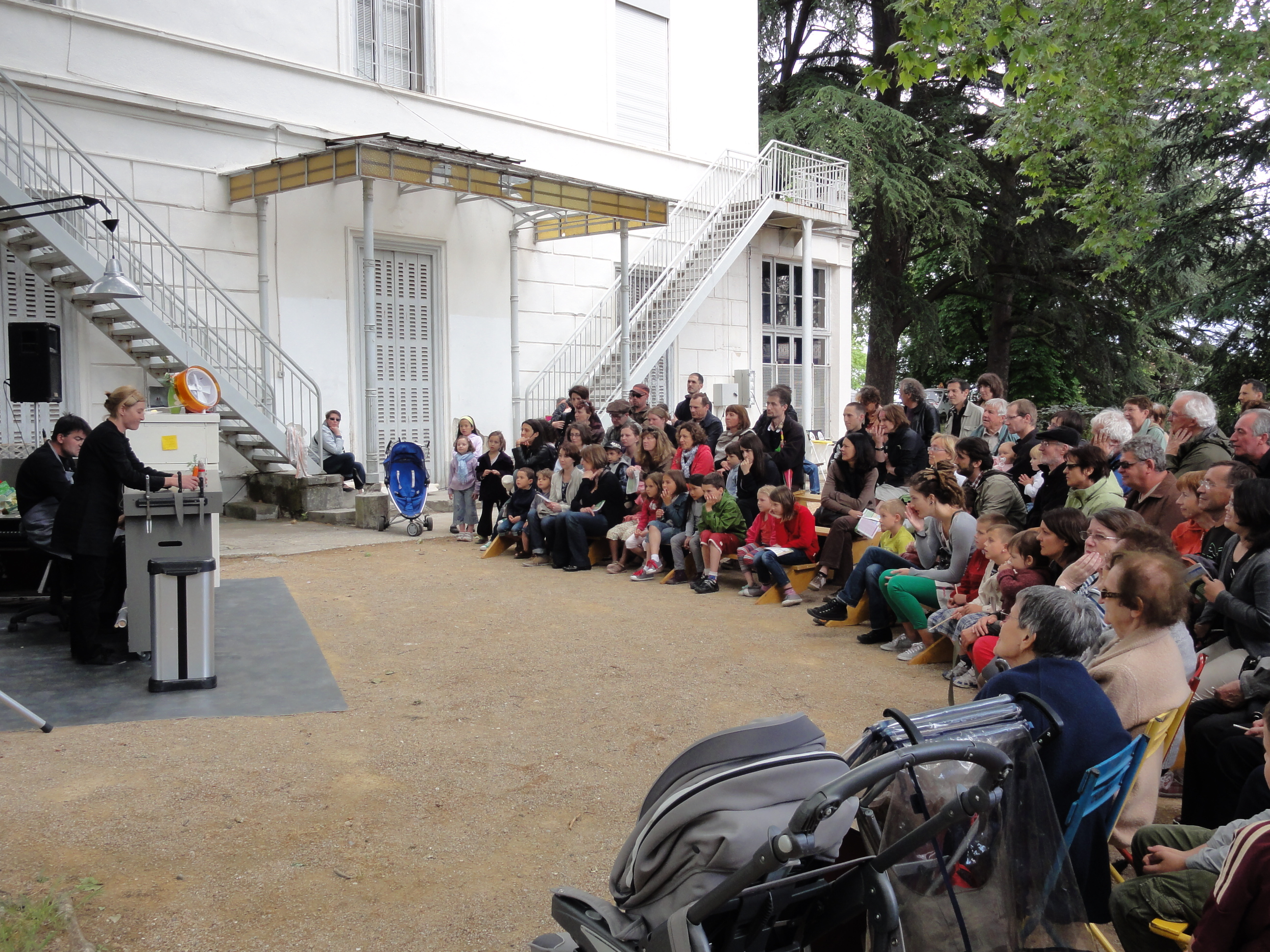 Spectacle lors de la Fête de l'iris d'Oullins (en mai) dans le parc Chabrières